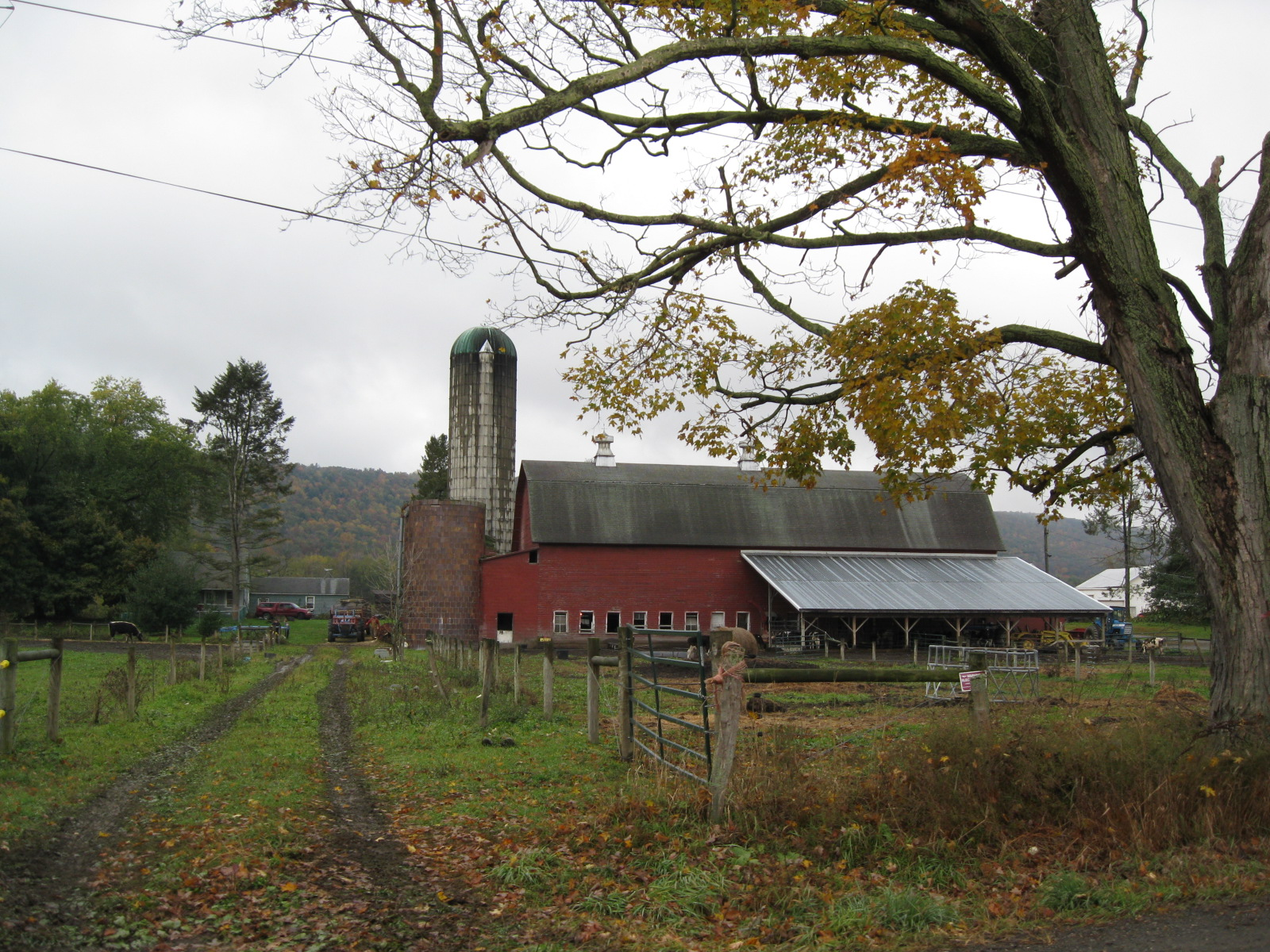 Wilawana, Pennsylvania